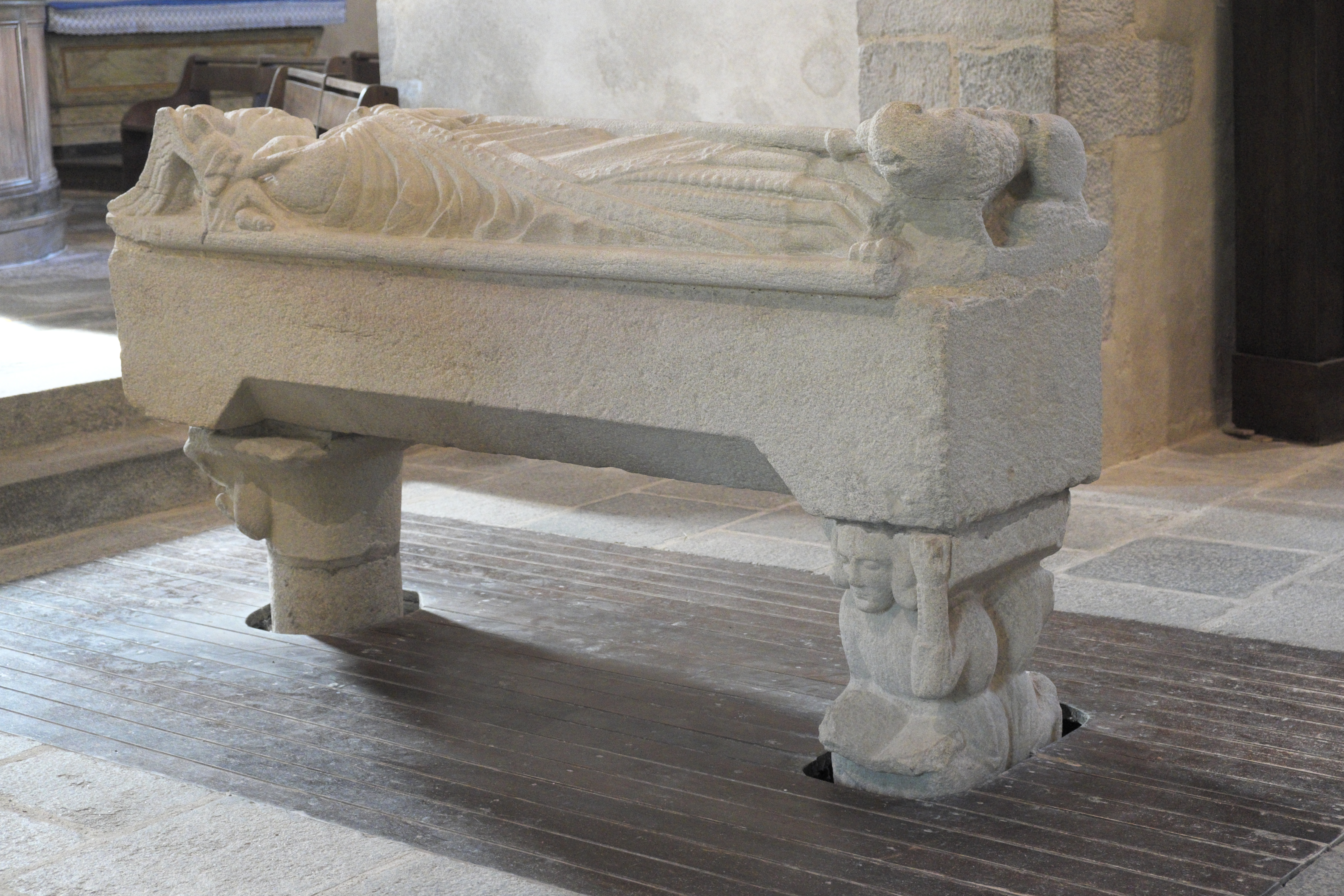 Alte Katholische Pfarrkirche Saint-Lunaire in Saint-Lunaire im Département Ille-et-Vilaine (Region Bretagne/Frankreich), Grab des heiligen Lunaire